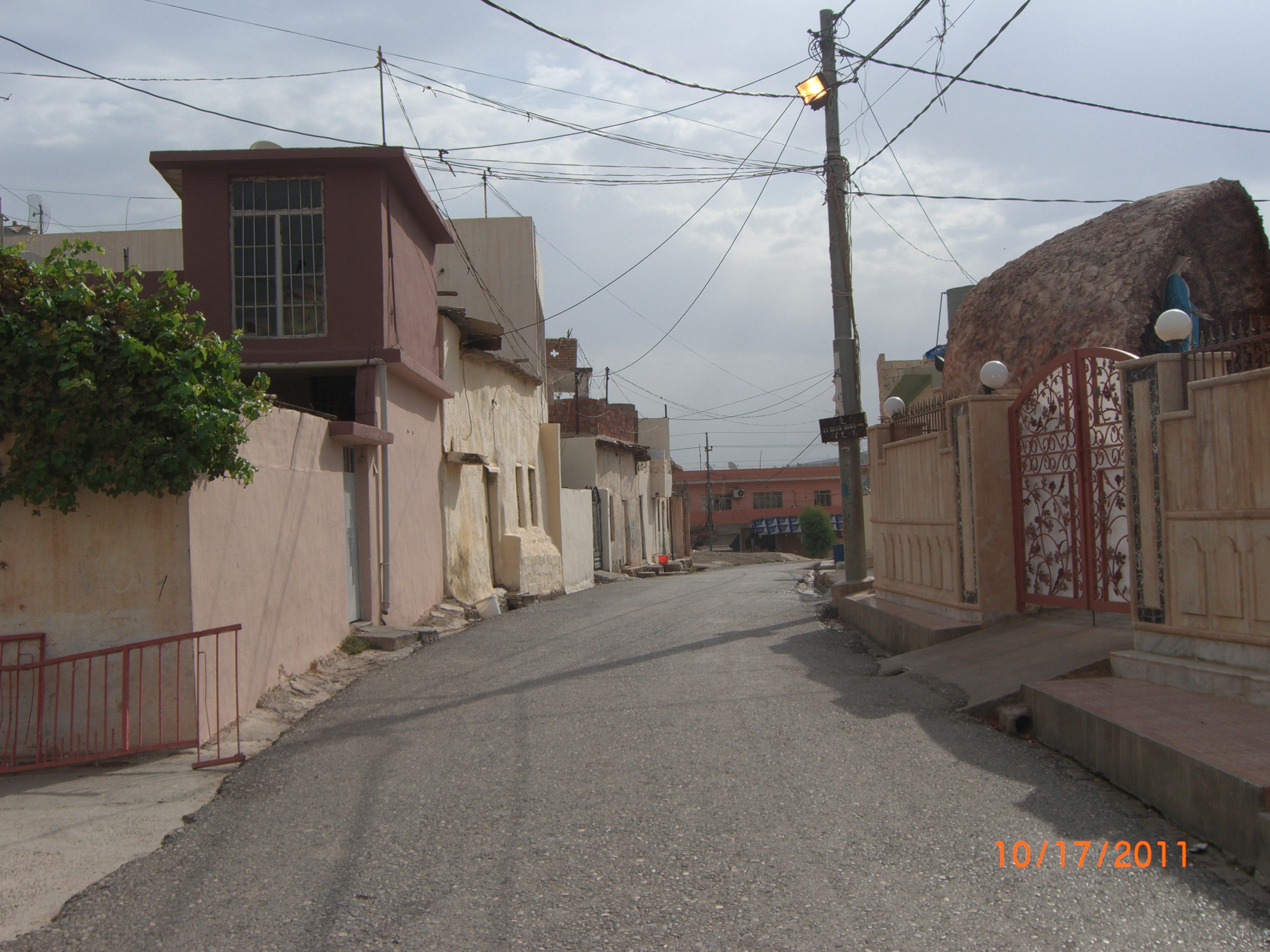 صورة لمحلة النصارى ذات الغالبية المسيحية في زاخو